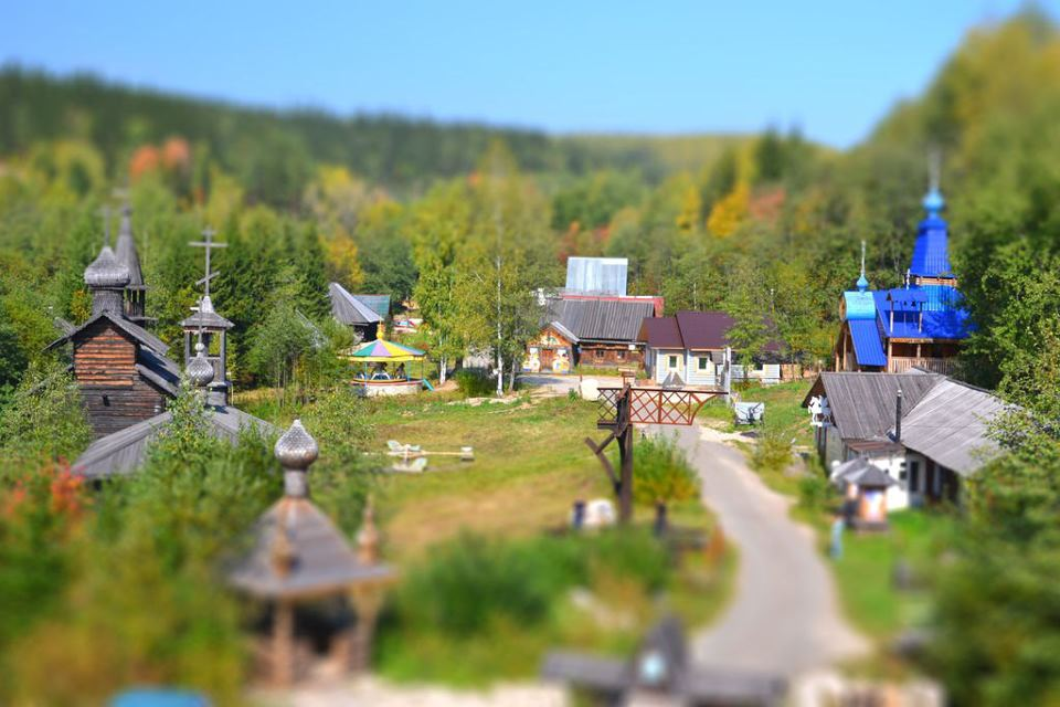 Этнографический парк истории реки Чусовой